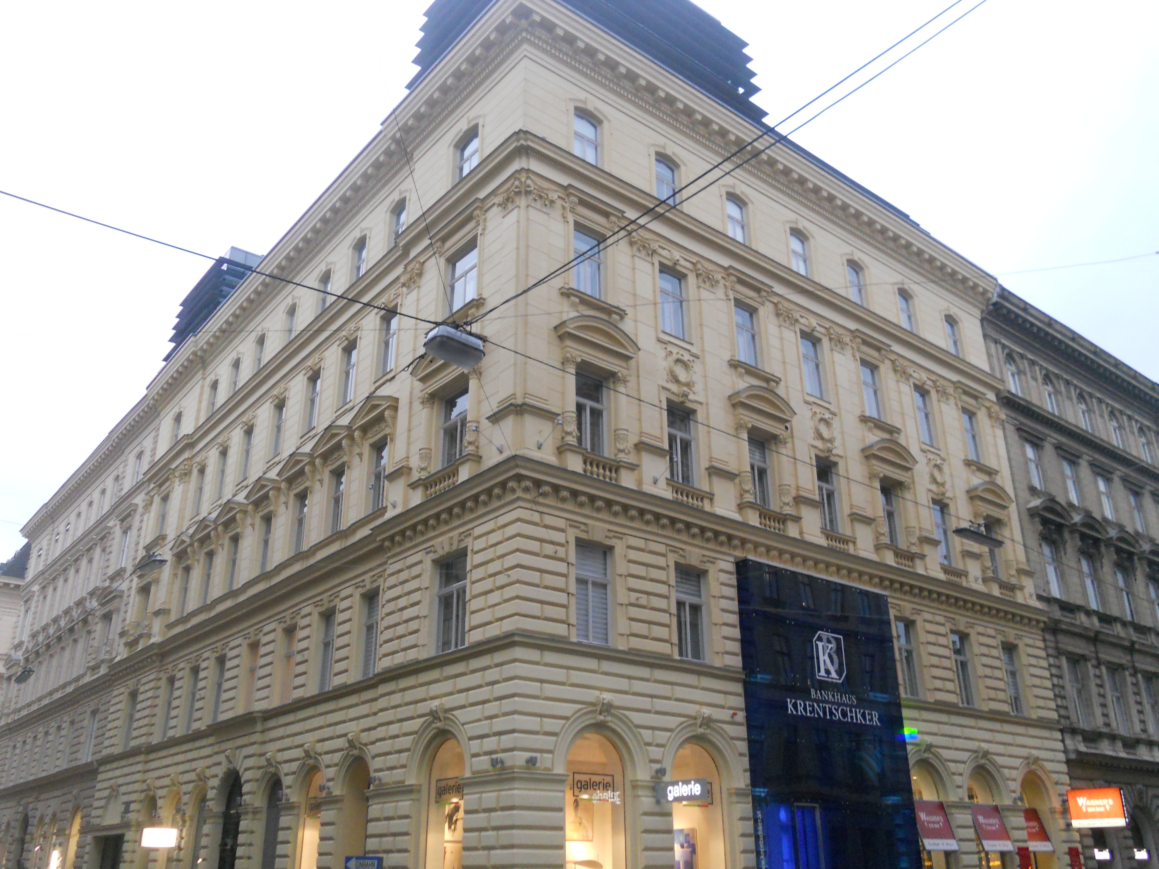 Wohn- und Geschäftshaus